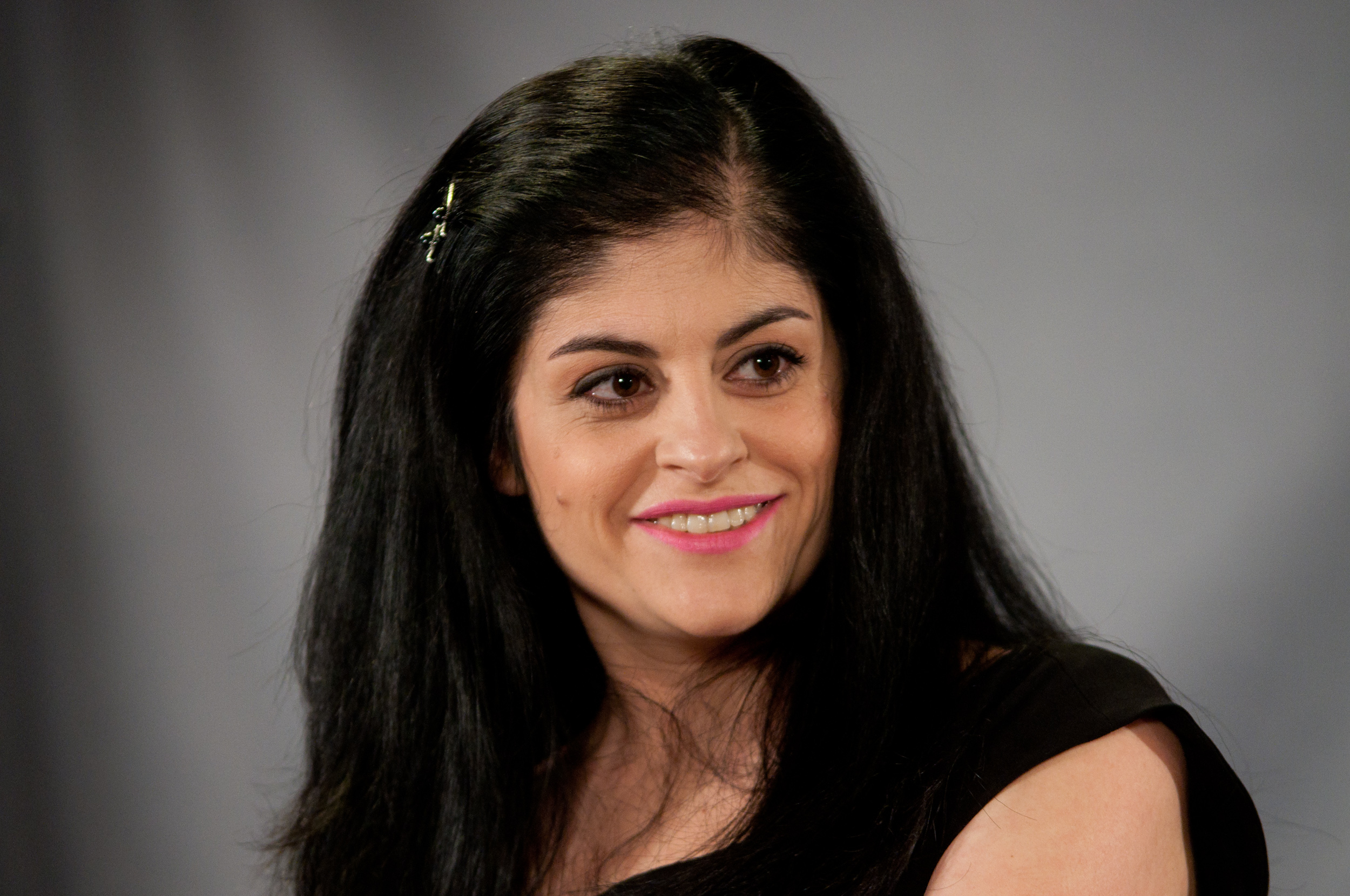 Dilba 2010 at a press conference for Melodifestivalen 2011